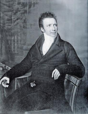 Rudolph Suhrlandt: Doktor med. Georg Behn, 1820 Bez. u. r. R. Suhrlandt 1820 Kniestück Ausführung in Lübeck, Verbleib: unbekannt Ehemals St. Annen-Museum